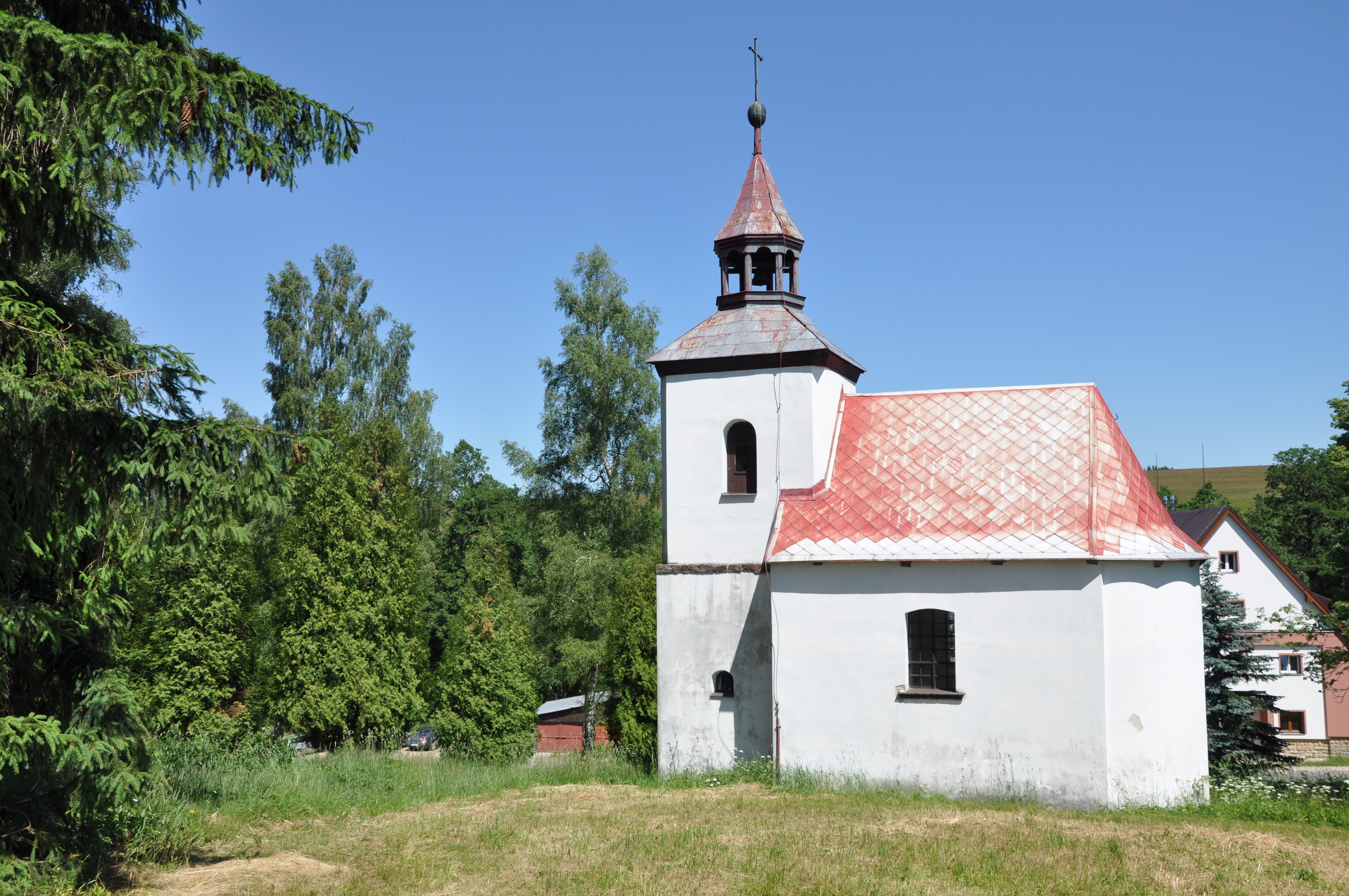 Česky: Klášterec nad Orlicí-Čihák, okres Ústí nad Orlicí. Kaple svaté Anny.